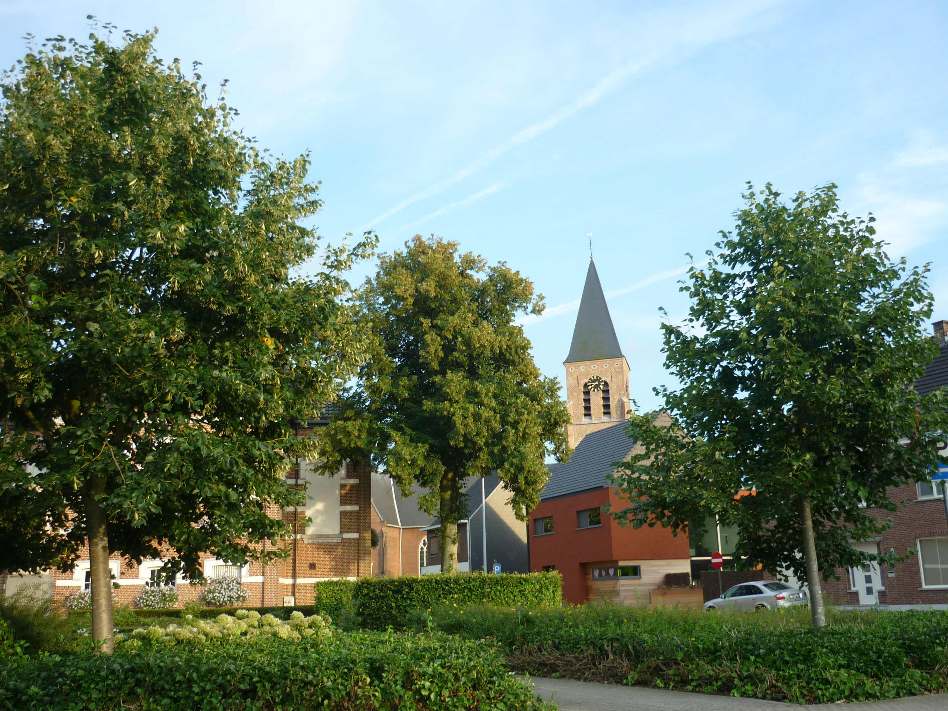 Foto van het dorpscentrum van Tielen (België). Getrokken vanuit de westelijke kant, gericht naar het oosten. Op de foto ziet u het plein van het dorpscentrum met op de achtergrond de Sint-Margharitakerk en het oude gemeentehuis.